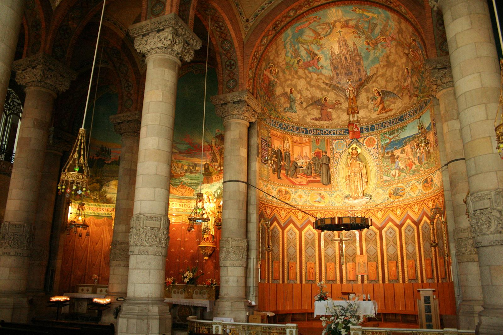 Cripta del Temple Expiatori del Sagrat Cor, Tibidabo (Barcelona-Catalunya)